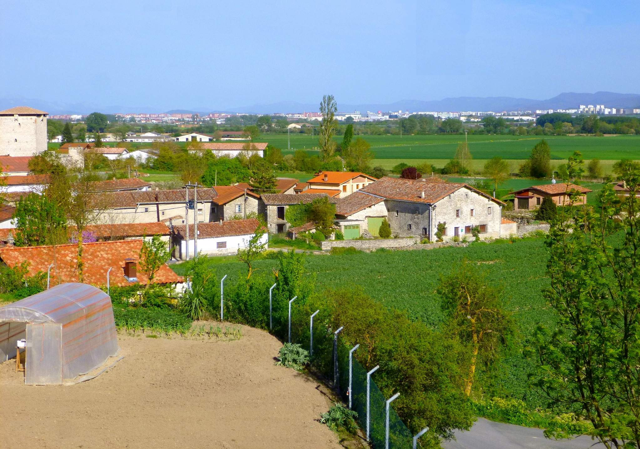 Mendoza (Vitoria, Álava)